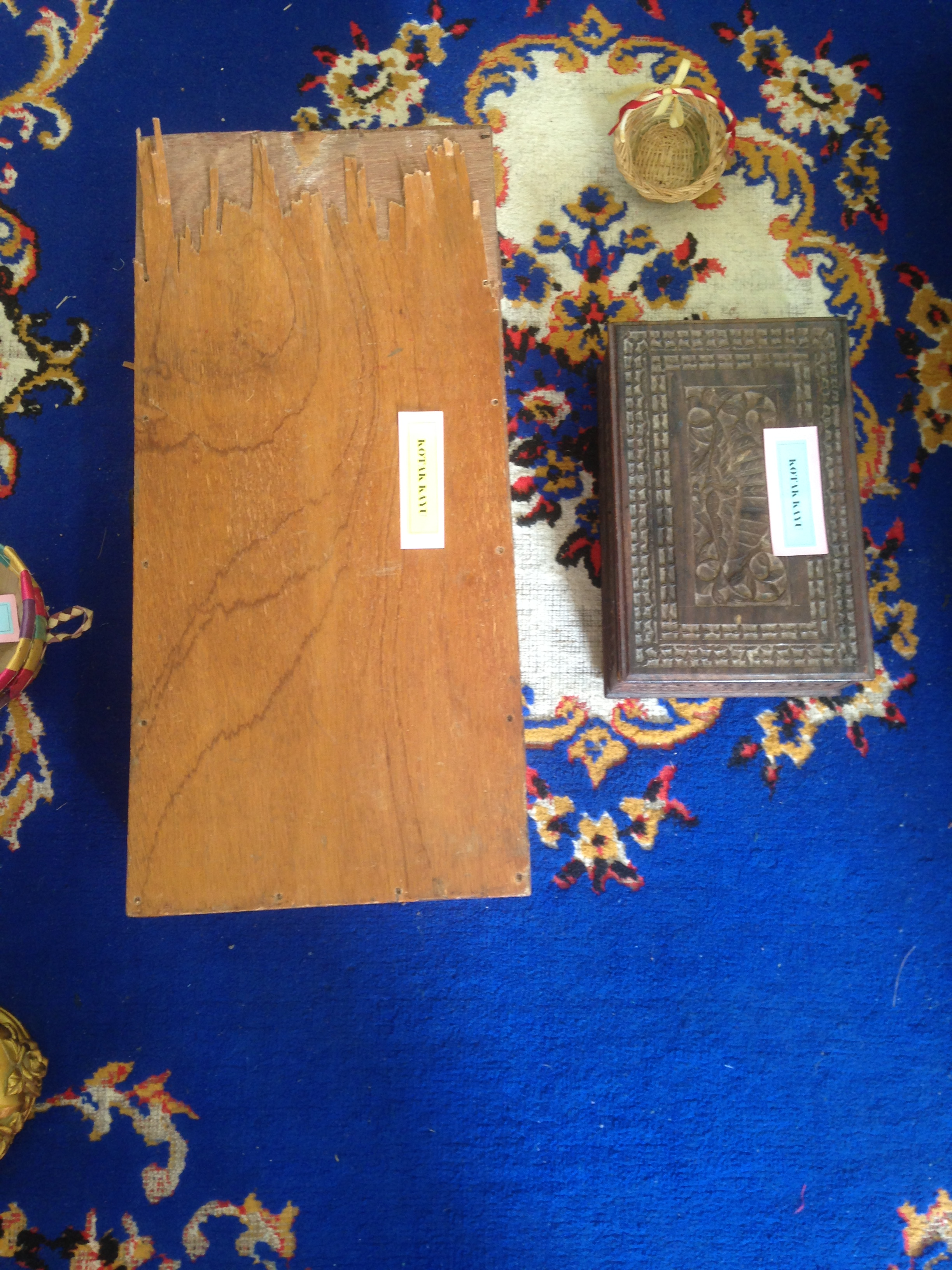 KOTAK KAYU